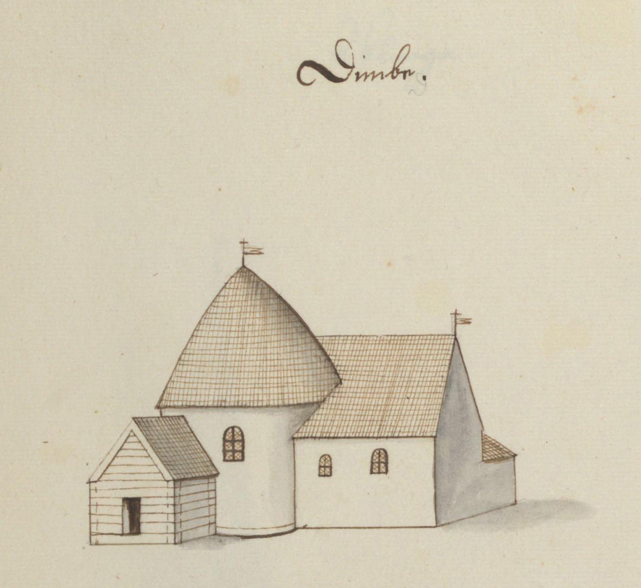 Dimbo kyrka Kyrka, äldre, teckning ur Peringskiölds Monumenta, avfotograferad i färg.